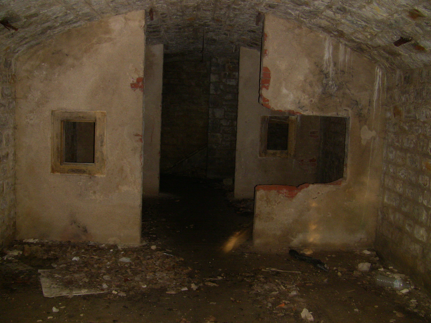 Une pièce de la batterie de mortiers de Planoise.